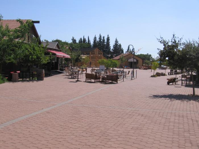 אניעם, כפר אמנים.